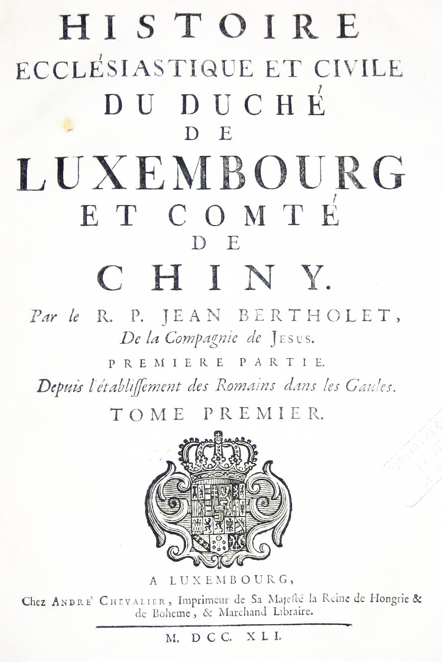 Deckbalt vum 1. Band vum Jean Bertholet senger Histoire ecclésiastique et civile du Duché de Luxembourg et Comté de Chiny.